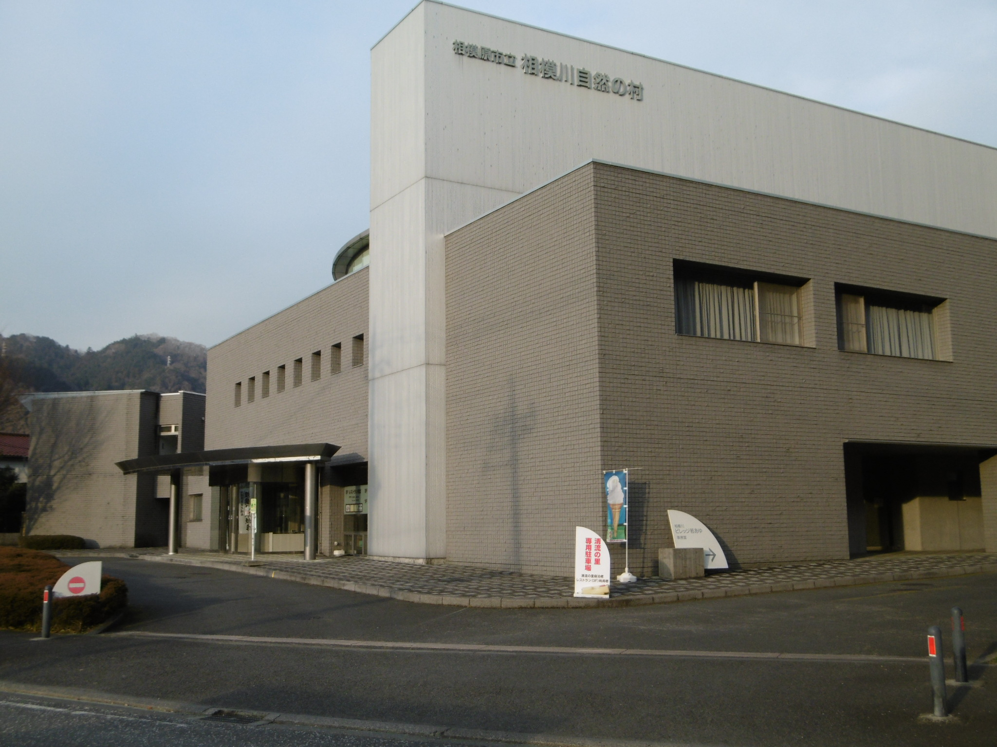 神奈川県相模原市緑区大島地区に存在する相模原市立相模川自然の村。